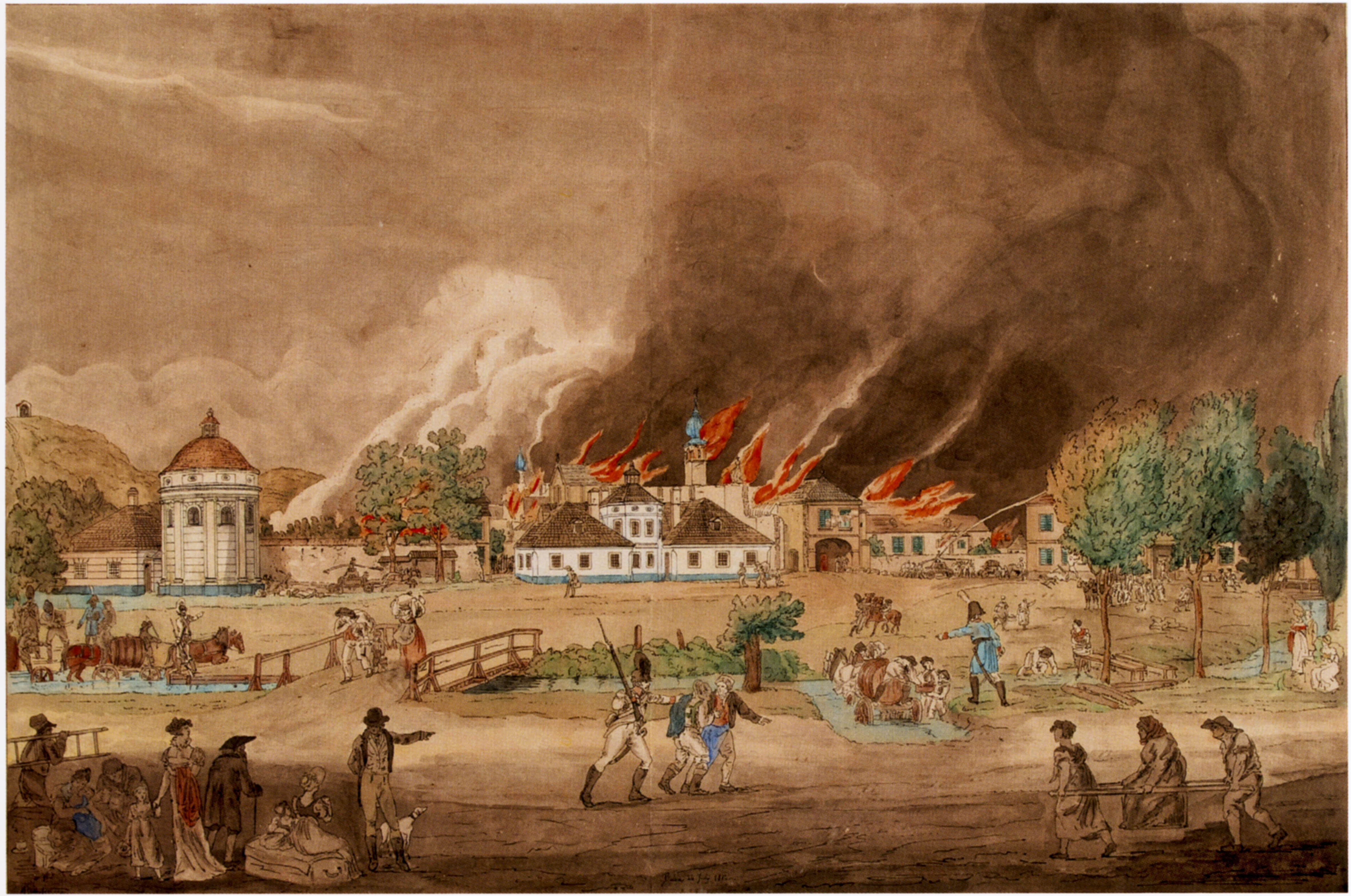 Baden bei Wien, Stadtbrand am 26. Juli 1812 (zeitgenössisches Aquarell)